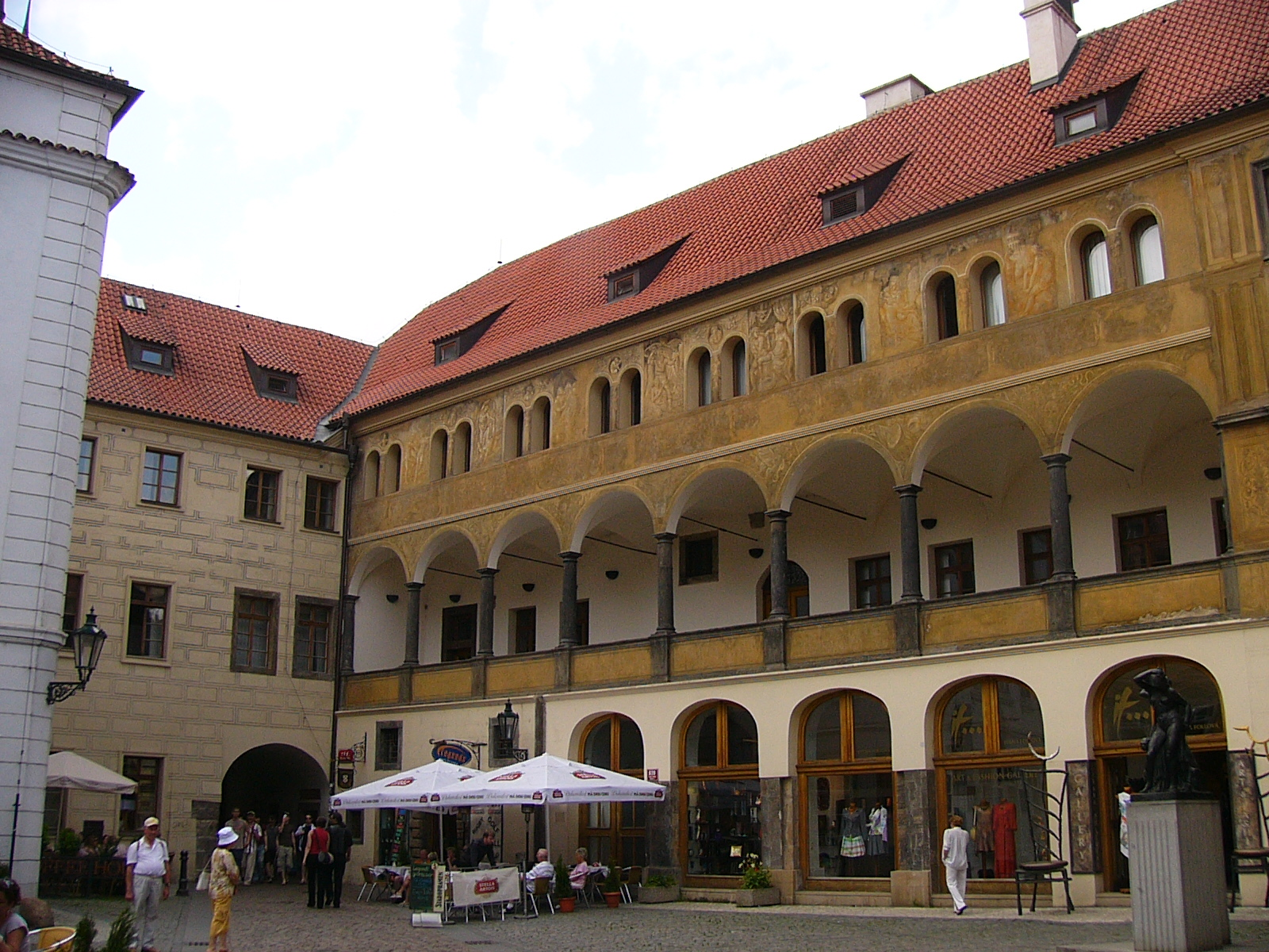 Ungelt, Týnský dvůr; kulturní památka č. 44532/1-349